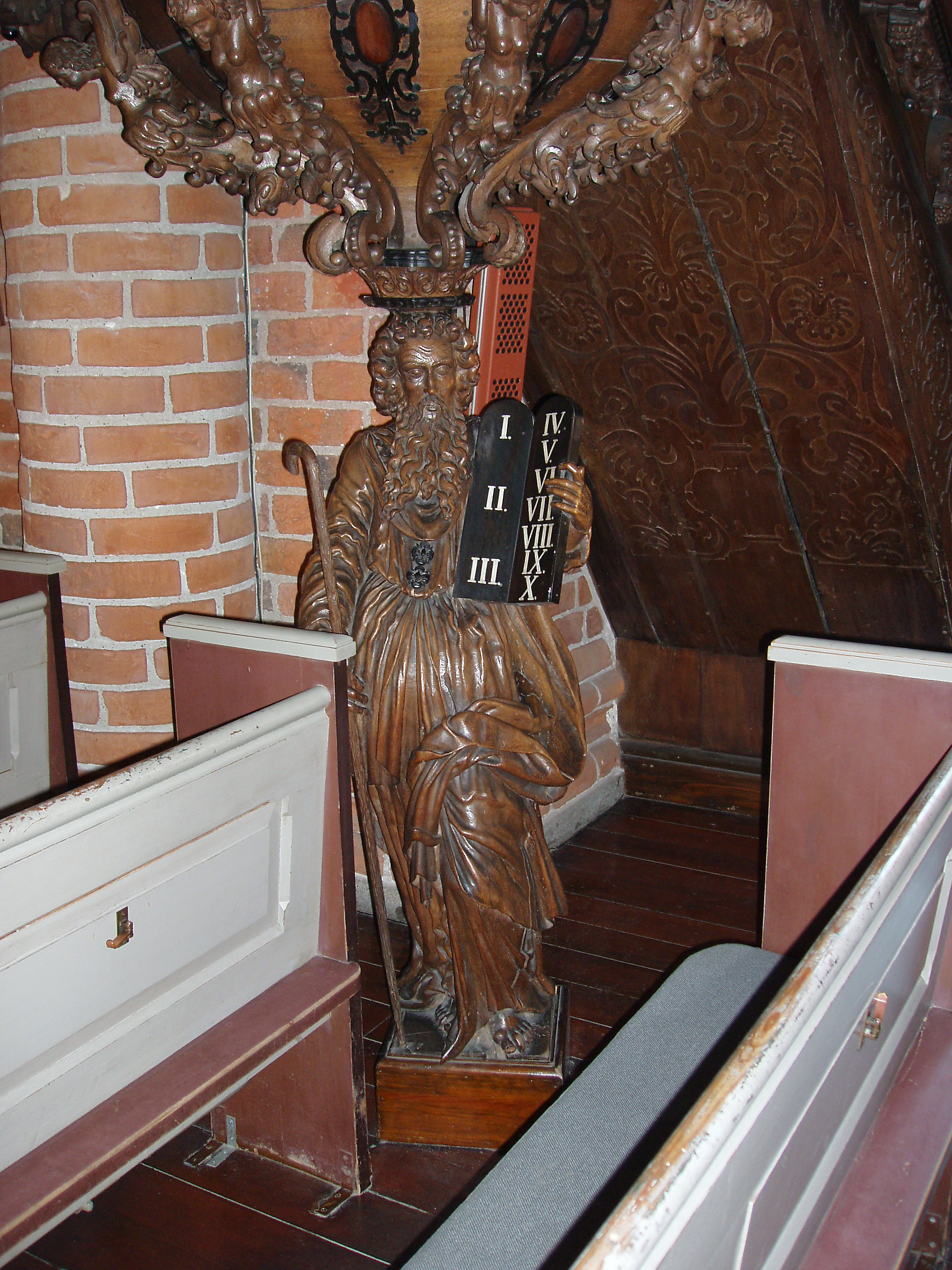 Foden af Prædikestolen Vor Frelser Kirke Horsens